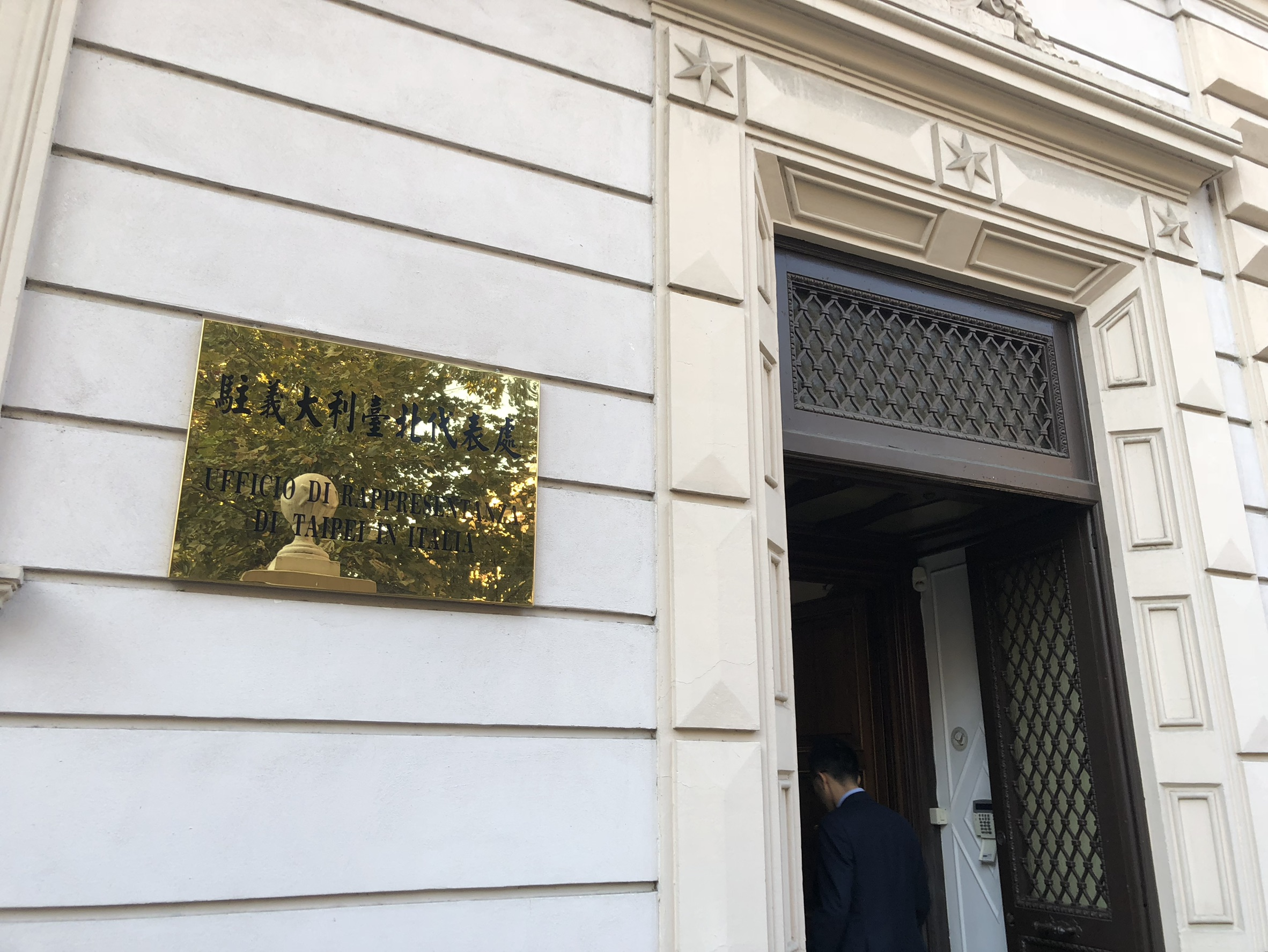 10.12 「聖誼專案」副總統視察駐義大利代表處